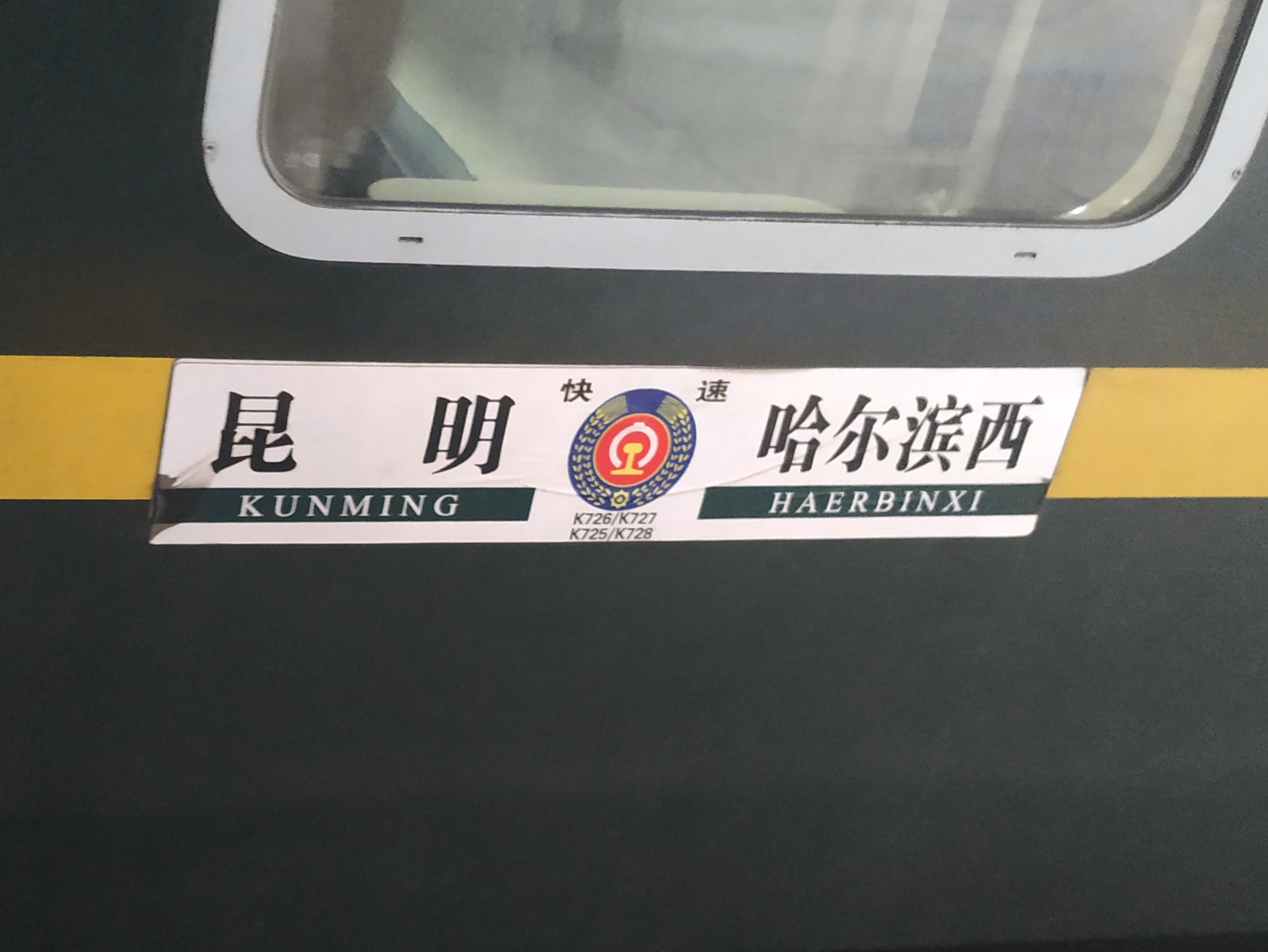 中文（中国大陆）: 昆明到哈尔滨西的K726